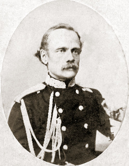 Sigizmund Ignat'evič Serakovskij (1826-1863)